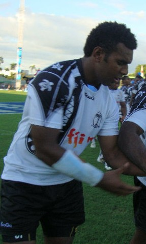 Timoci Nagusa (Fiji vs Japan, Pacific Nations Cup 2010).